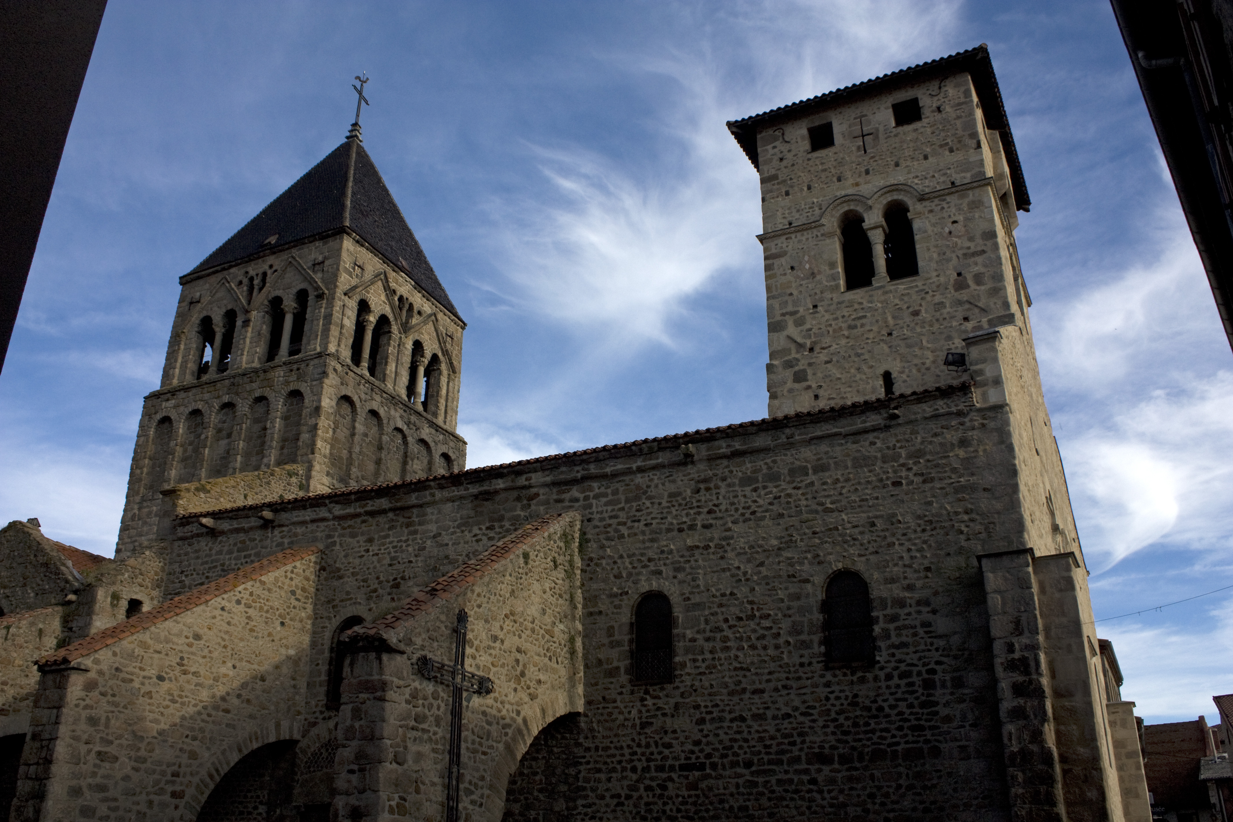 Vue générale de l'ensemble église-ancien prieuré.